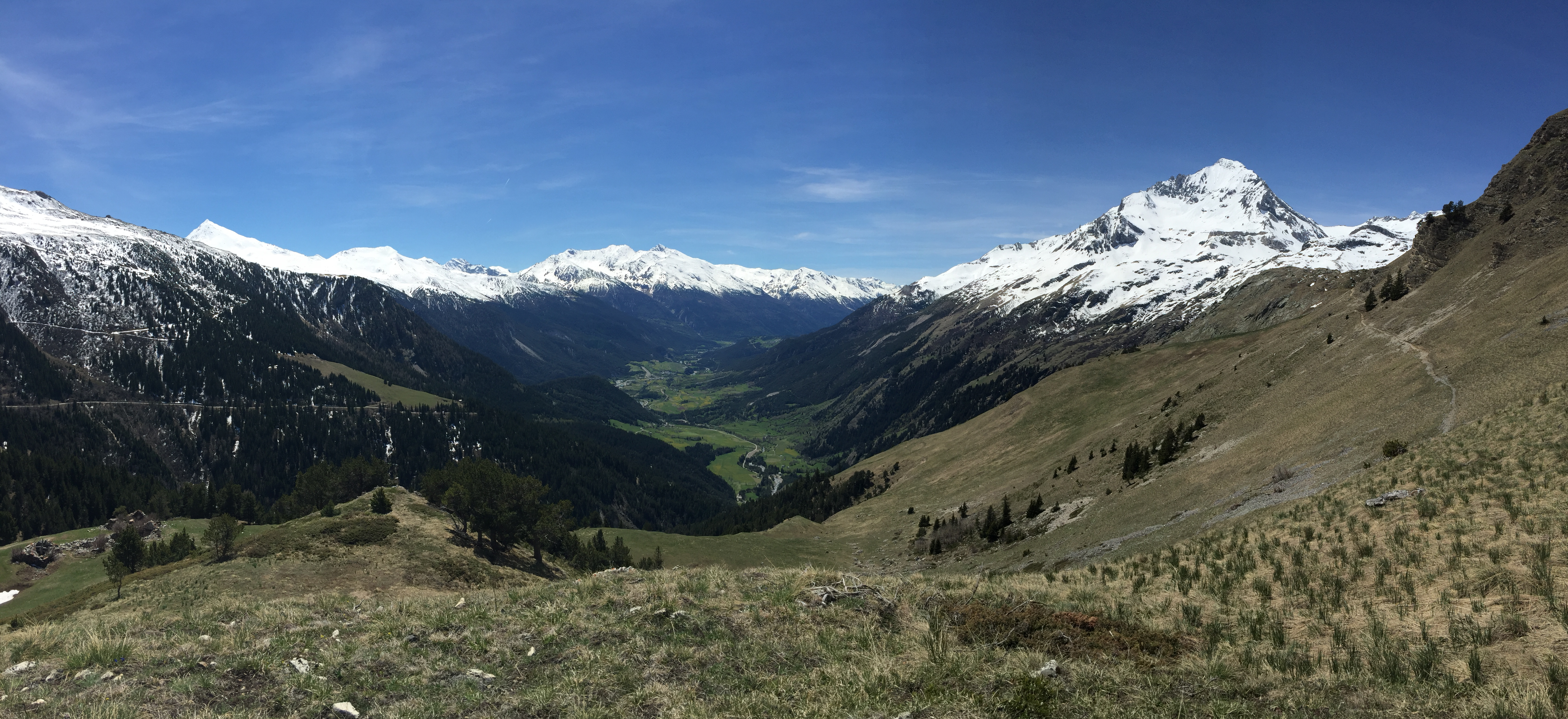 Cône de d'éjection de Termignon-Sollières en Hte Maurienne -Vanoise